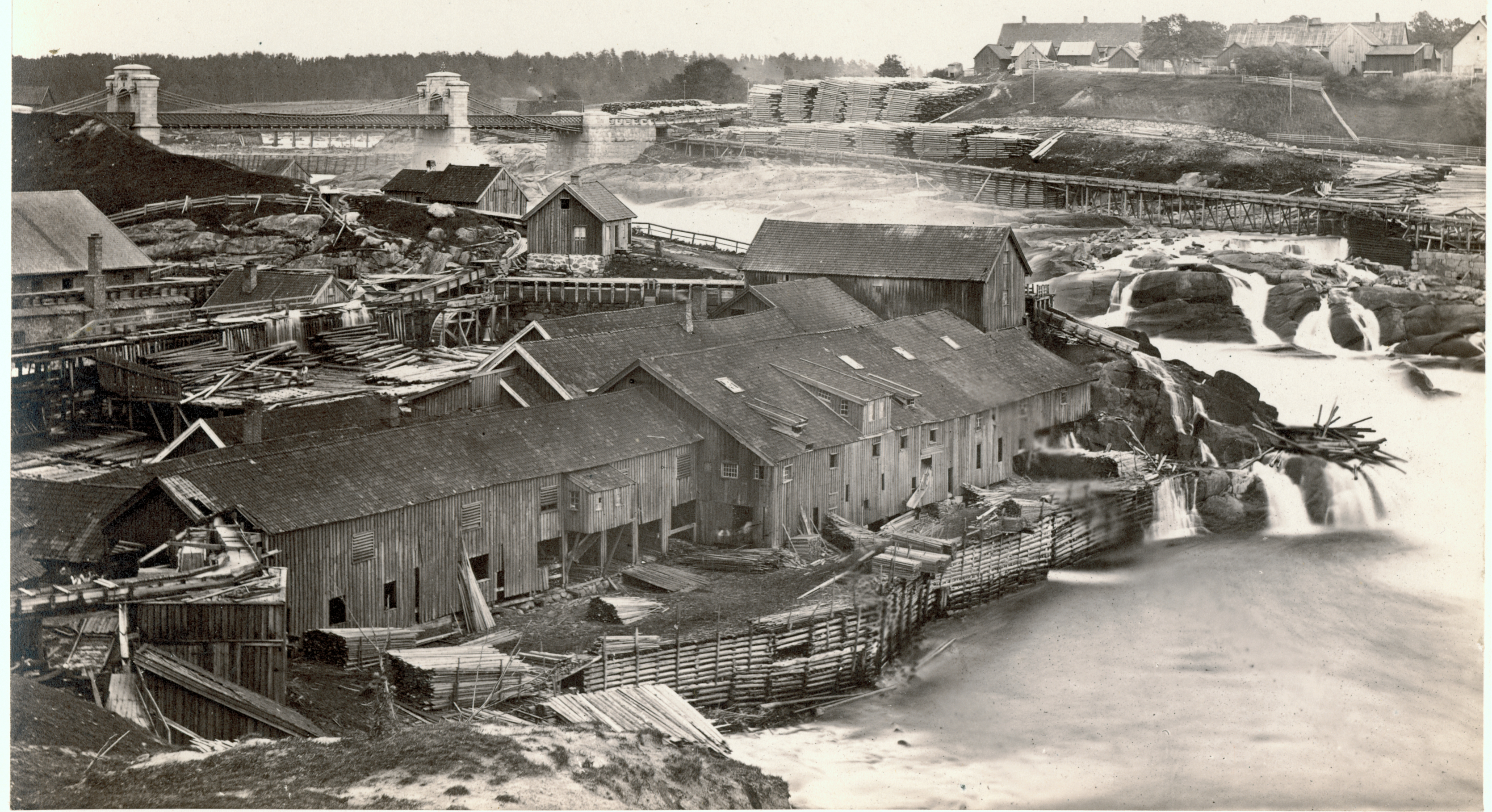 Borregård i Sarpsborg, Østfold This image on crowdsourcing geotagging platform Fotodugnad